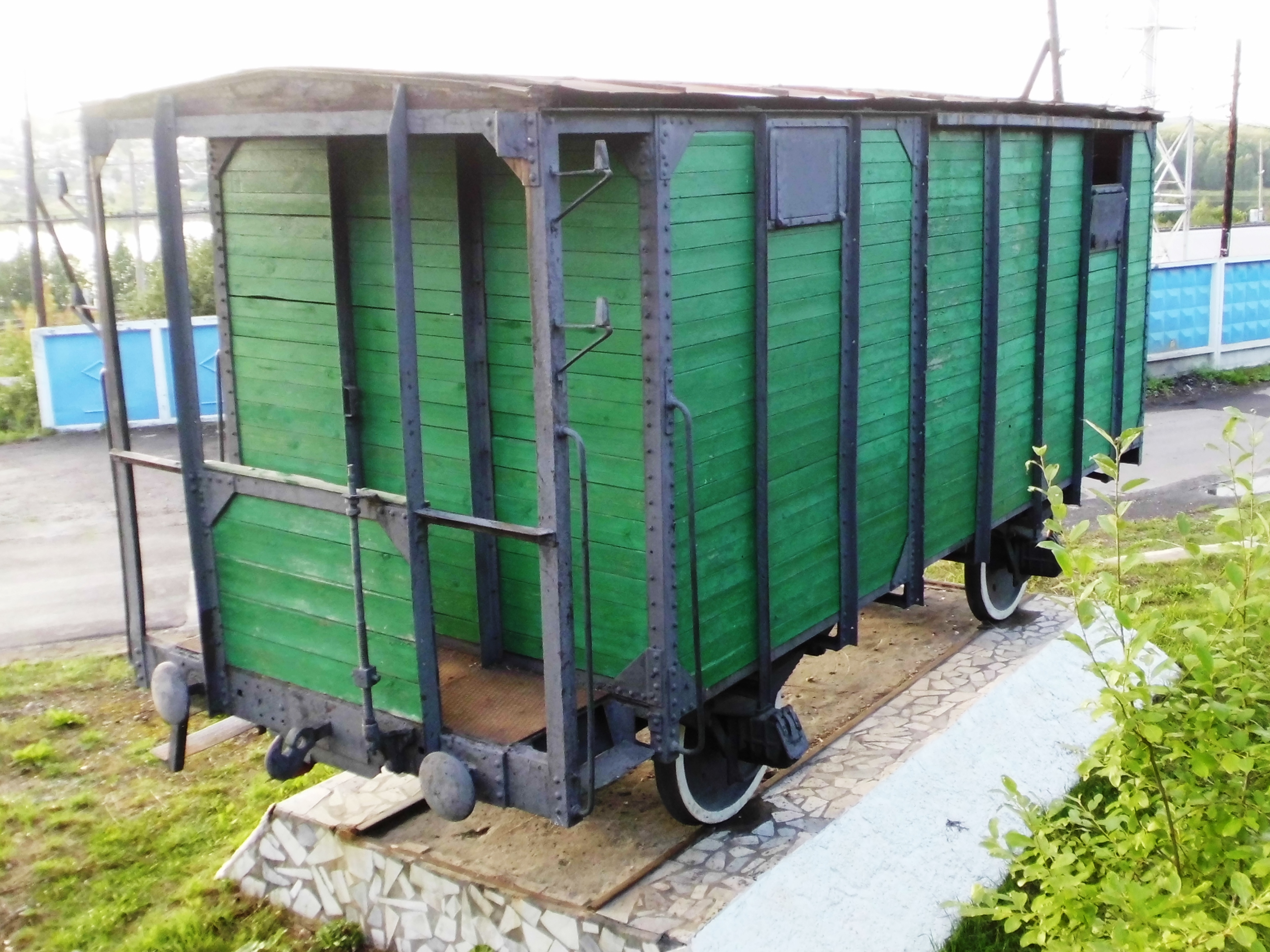 Двухосный нормальный товарный вагон с тормозной площадкой, изготовлен (согласно заводской табличке на раме) Тверским вагонным заводом в 1928 году, СССР. Расположен на облицованной уфалейским мрамором постаменте у въезда в вагонное депо железнодорожной станции Верхний Уфалей ЮУЖД. Оборудован винтовой сцепкой.